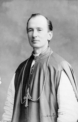 Cardinal Louis Nazaire Bégin